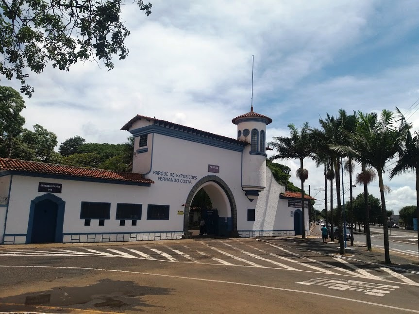 Parque de Exposições Fernando Costa, Franca (SP), Brazil